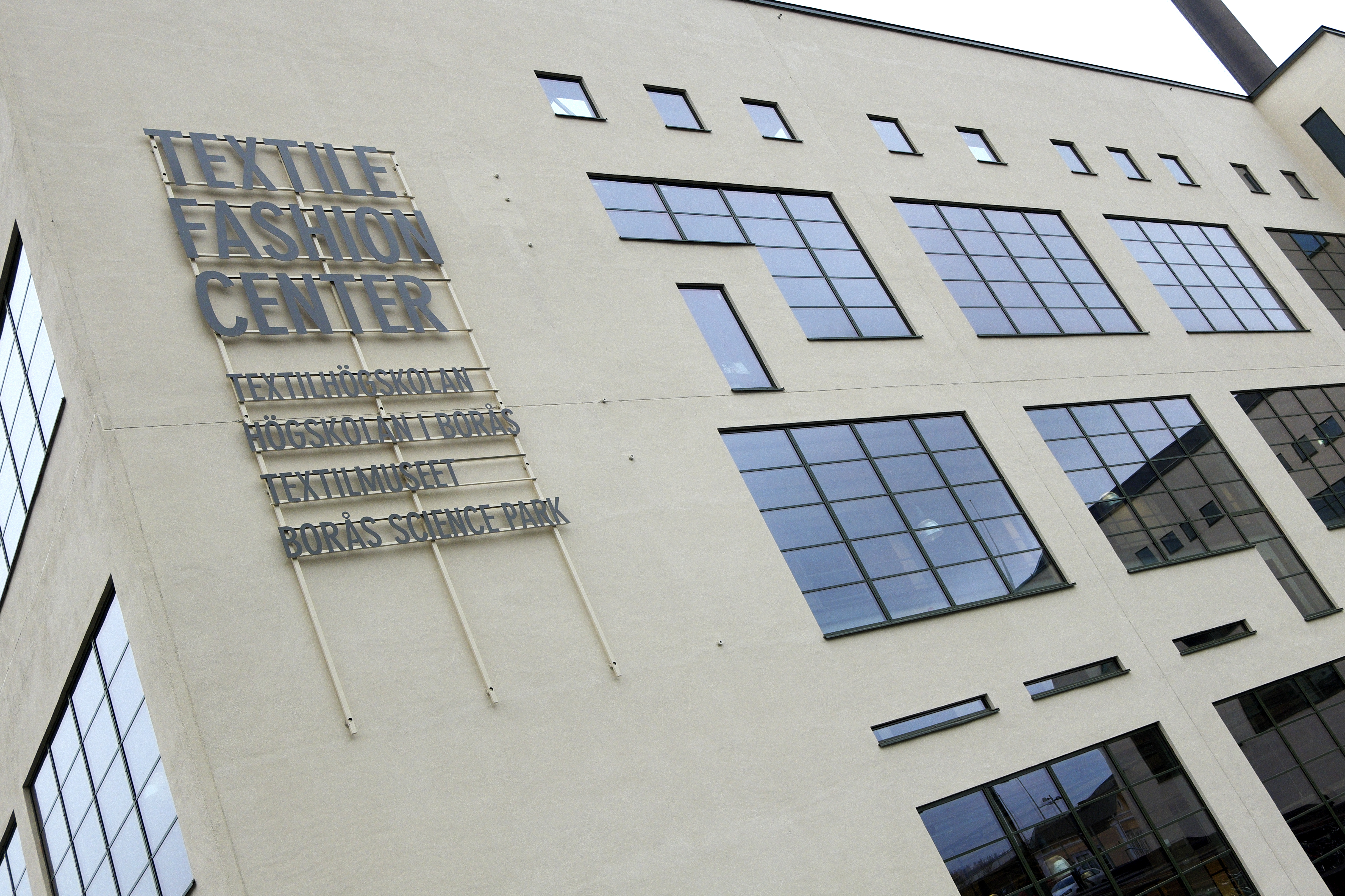 Textilmuseet i Textile Fashion Center